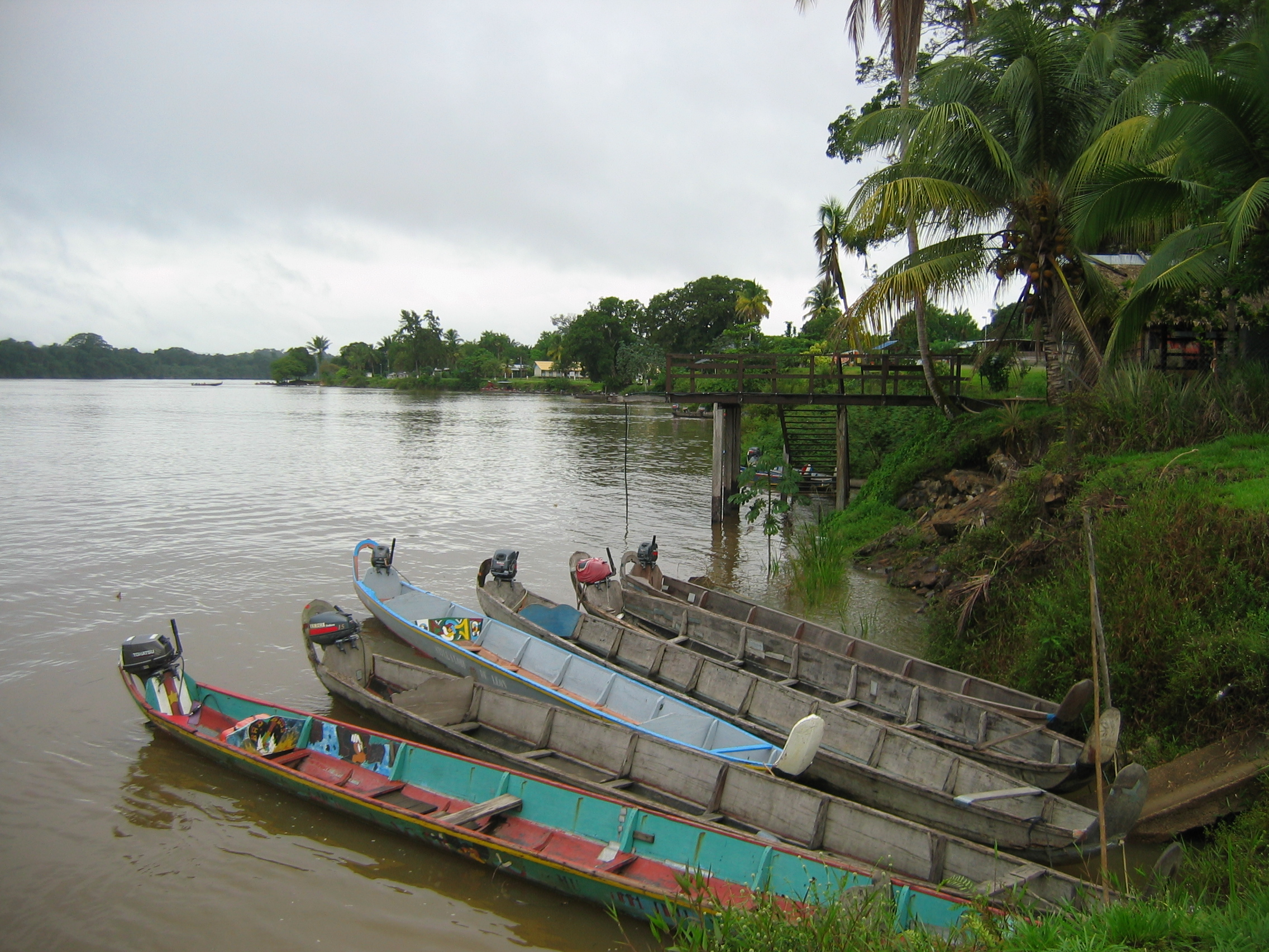 Grand Santi, aperçu du village